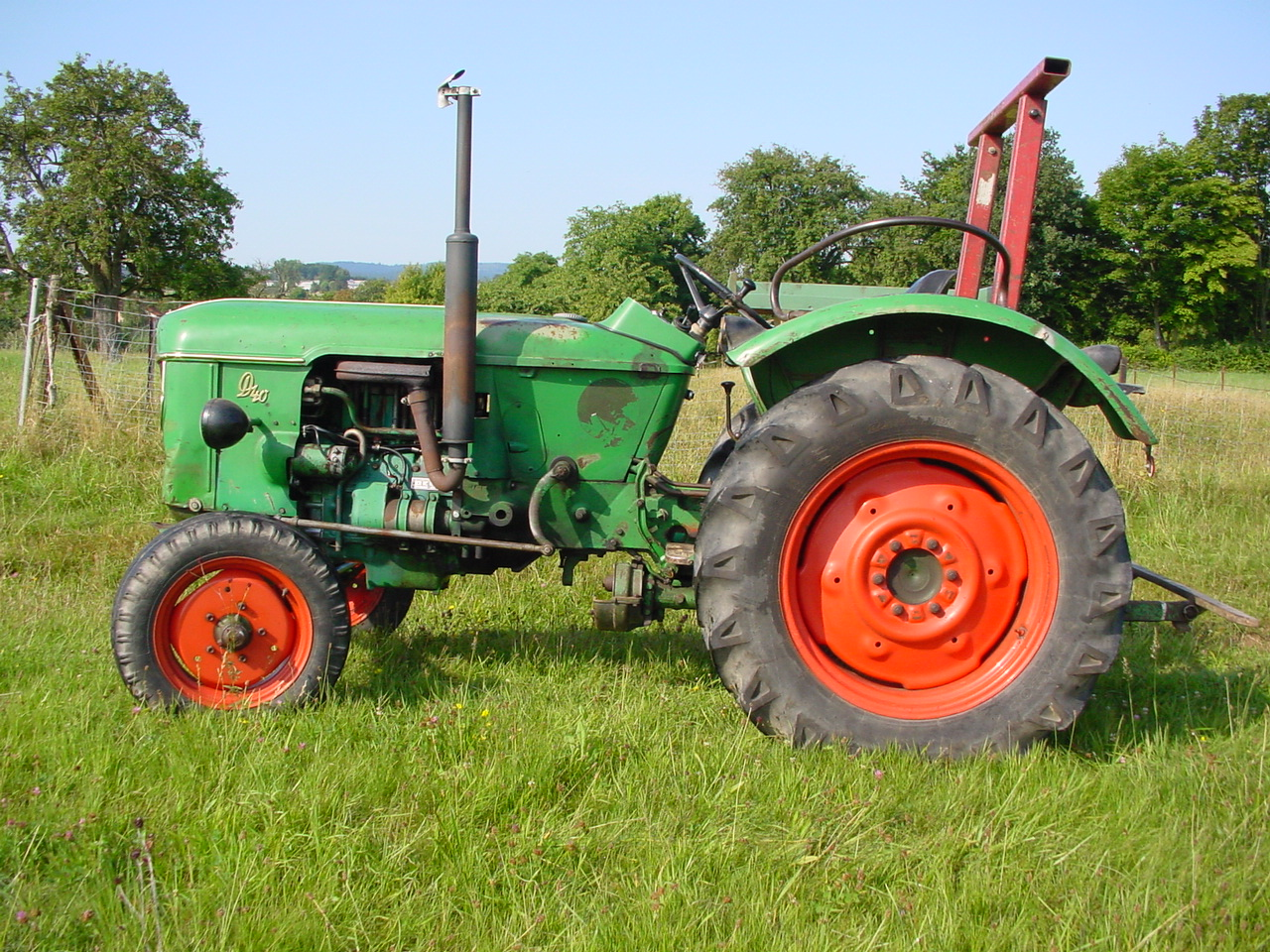 Traktor Deutz D 40.2, Baujahr 1963, nach ca. 8000 Betriebsstunden im Original-Zustand